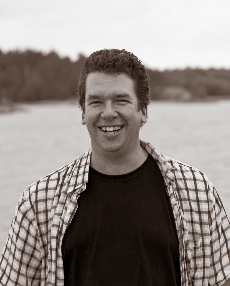 Porträtt av den finska kompositören Sebastian Fagerlund.